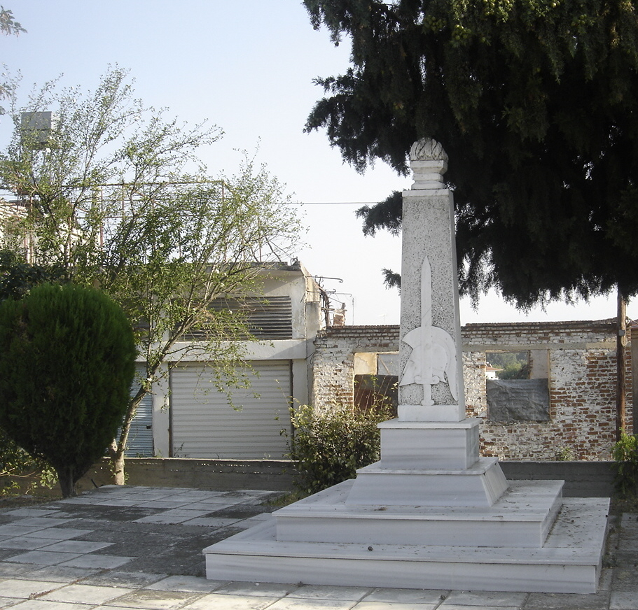 Memorial plaque in Ano Agios Ioannis, Katerini.